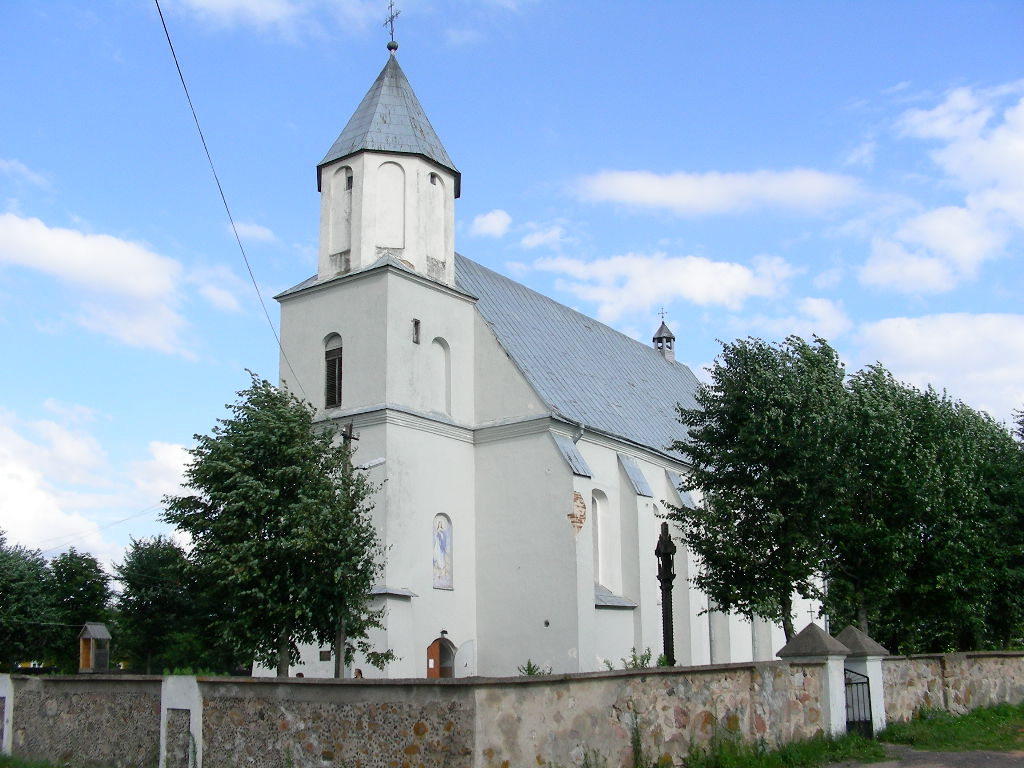 Беларуская (тарашкевіца): Былы кальвінскі збор. в. Дзераўная This is a photo of Belarusian heritage monument. Reference number: 612Г000611 ( WLM)